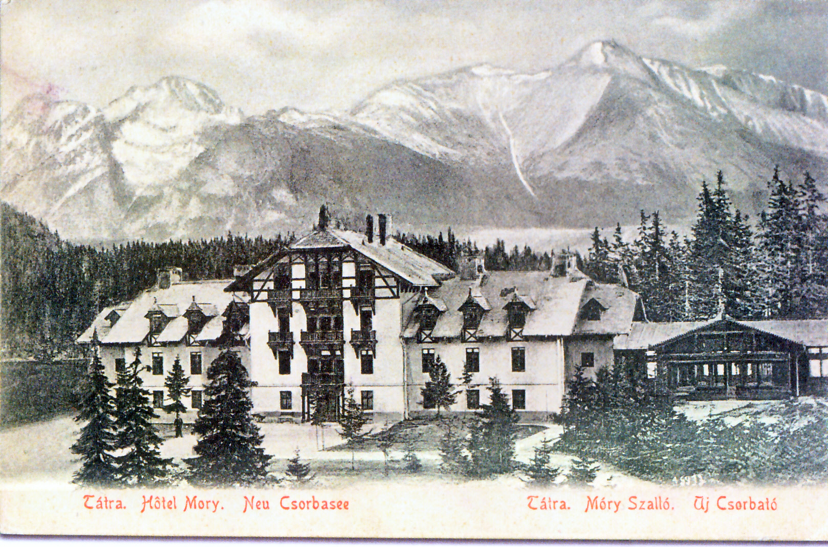 Architekt Karol Móry z Banskej Bystrice postavil v roku 1905 pod Štrbským Plesom na močariskách hotel a vybudoval novú osadu - Nové Štrbské Pleso.